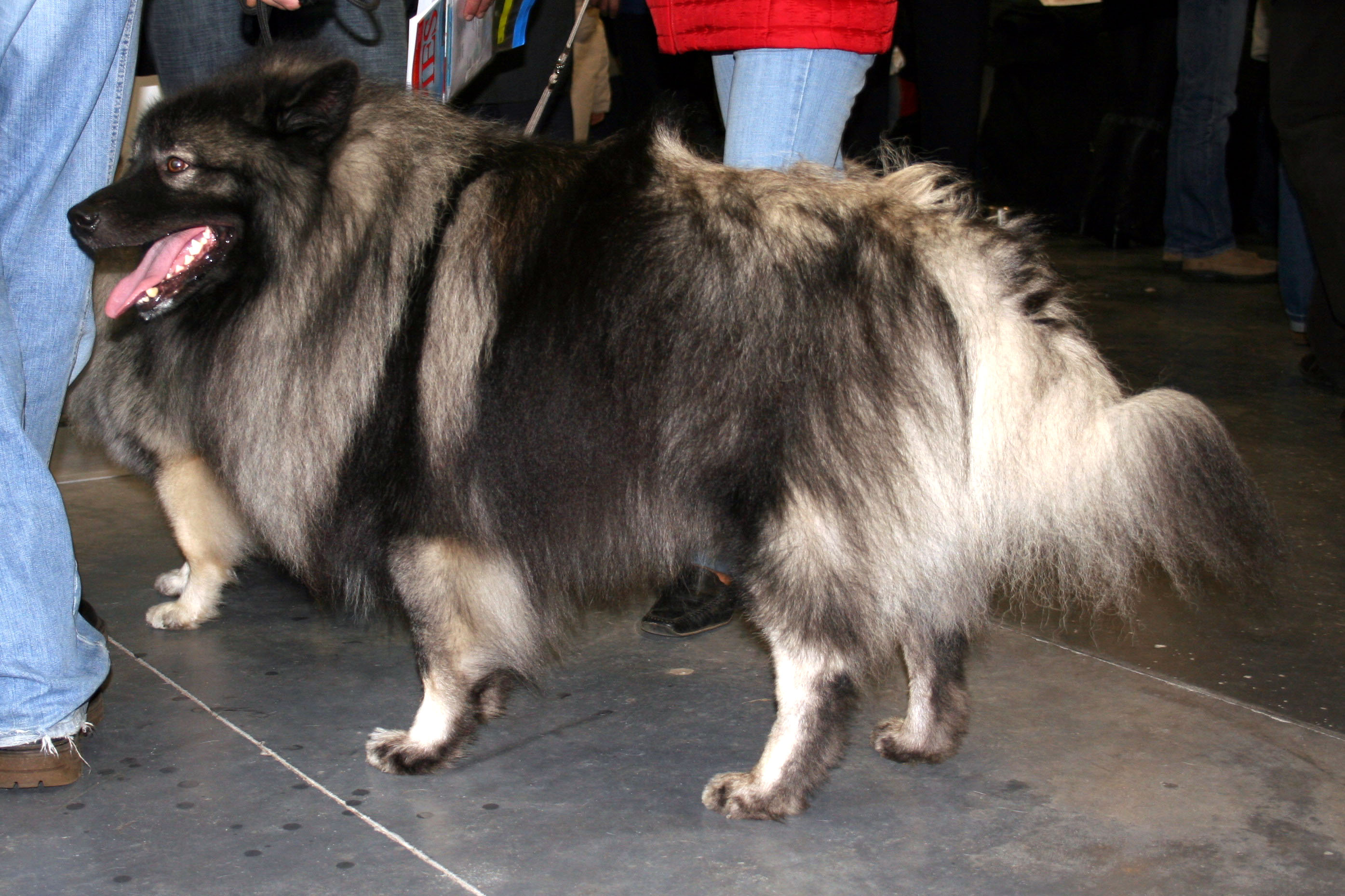 Szpic_wilczy na Światowej Wystawie Psów Rasowych w Poznaniu